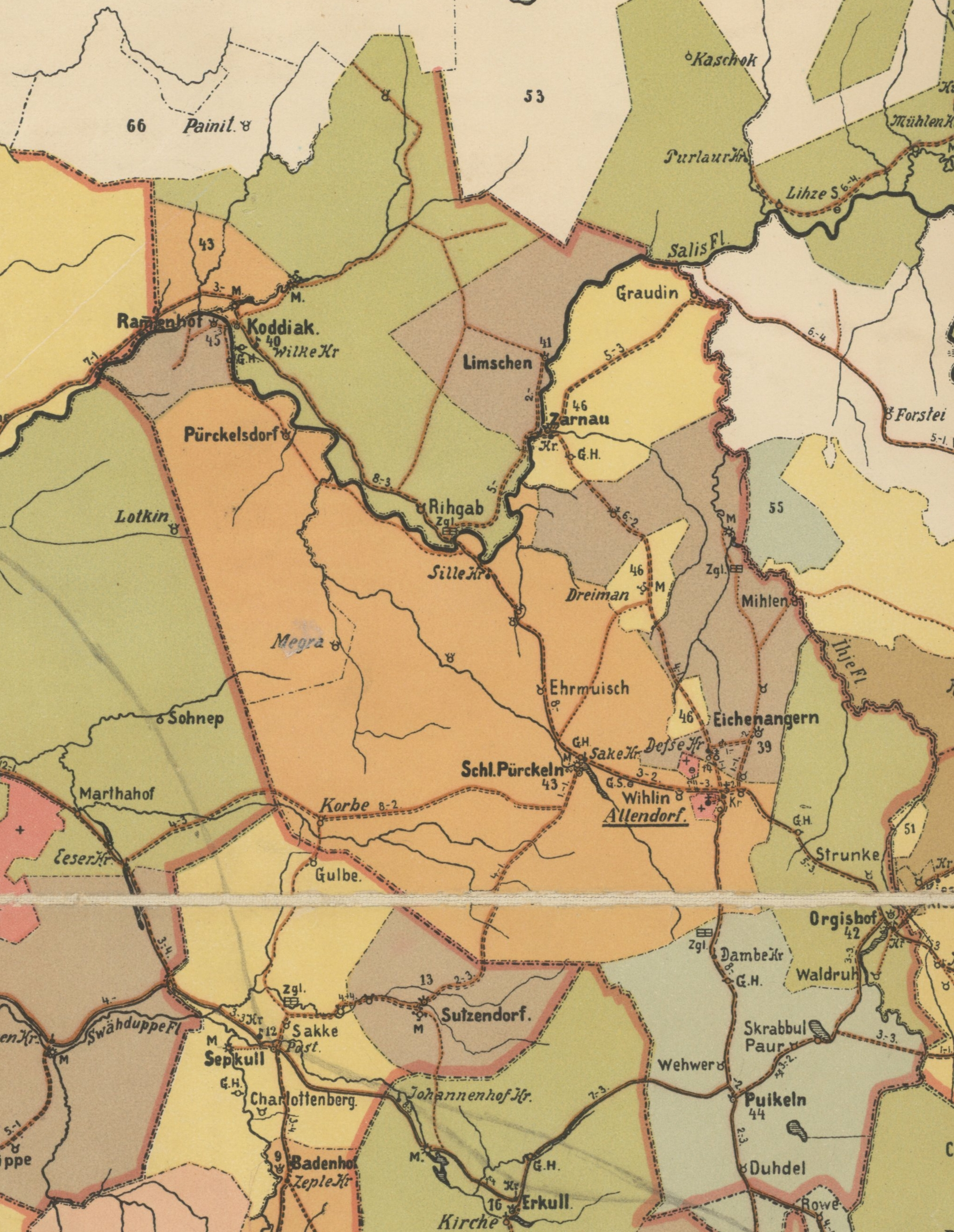 Aloja kihelkonna mõisad 1903. aasta kaardil.